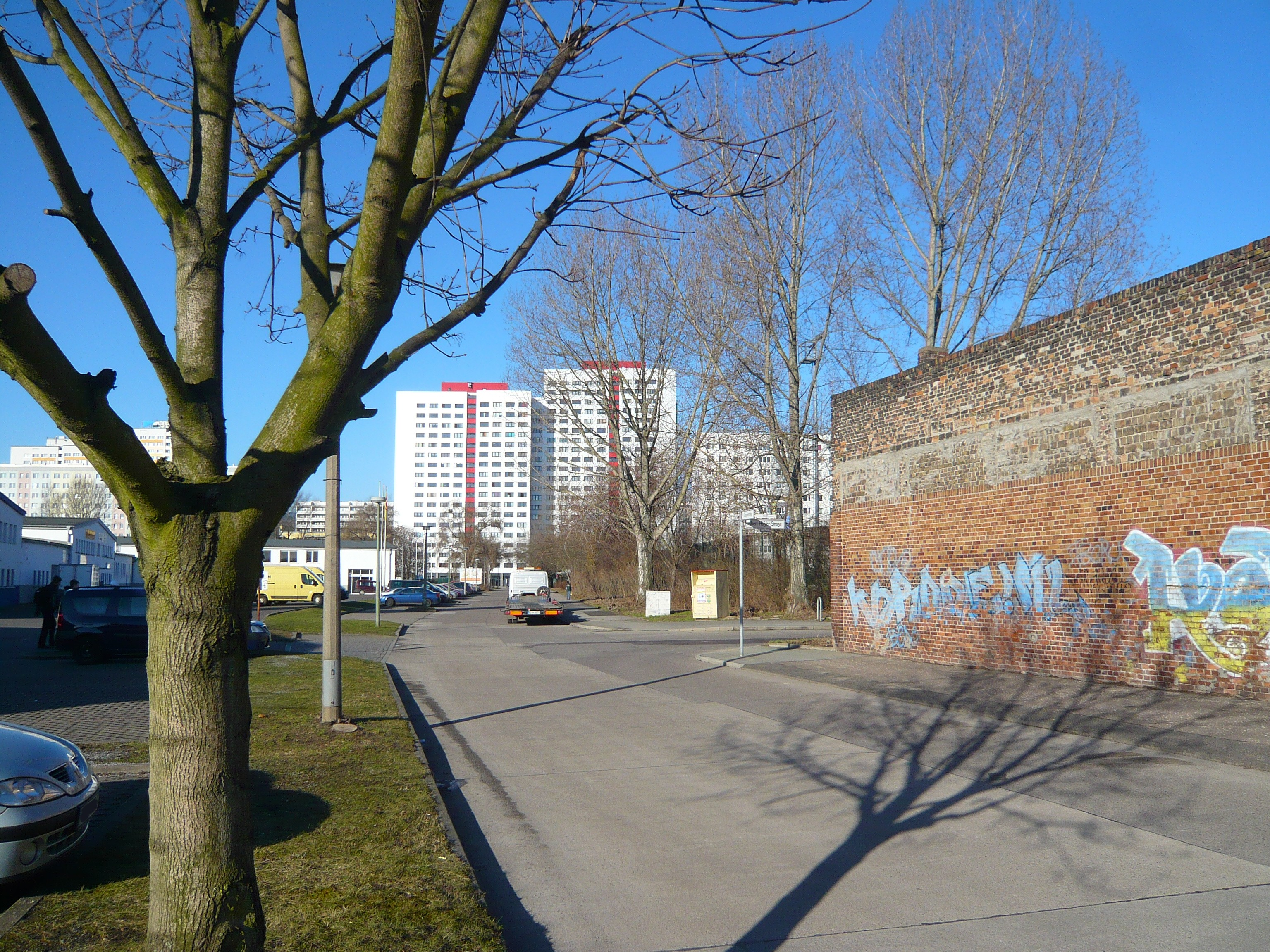 Straße in Lichtenberg: Coppistraße